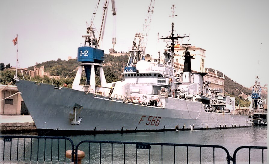 La fregata Perseo a Malaga